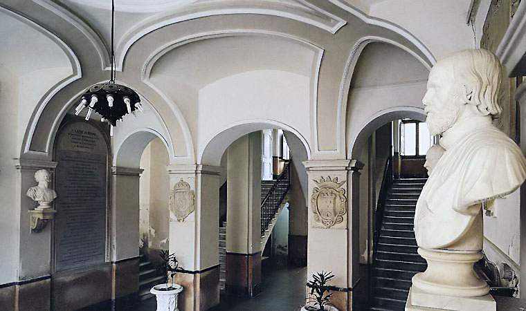 Municipio di Sassari